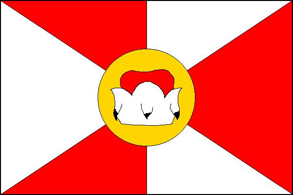 Vlajka obce Nové Sedlo